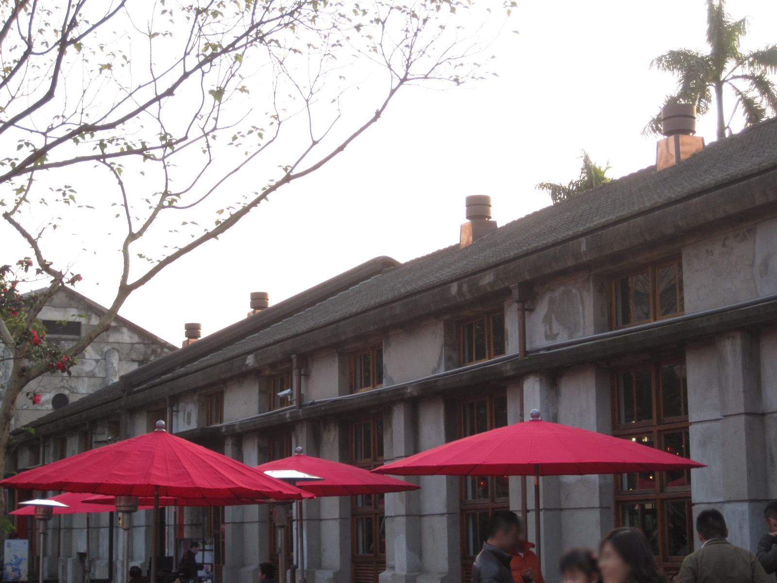 中文（台灣）: 松山菸廠機器修理廠。